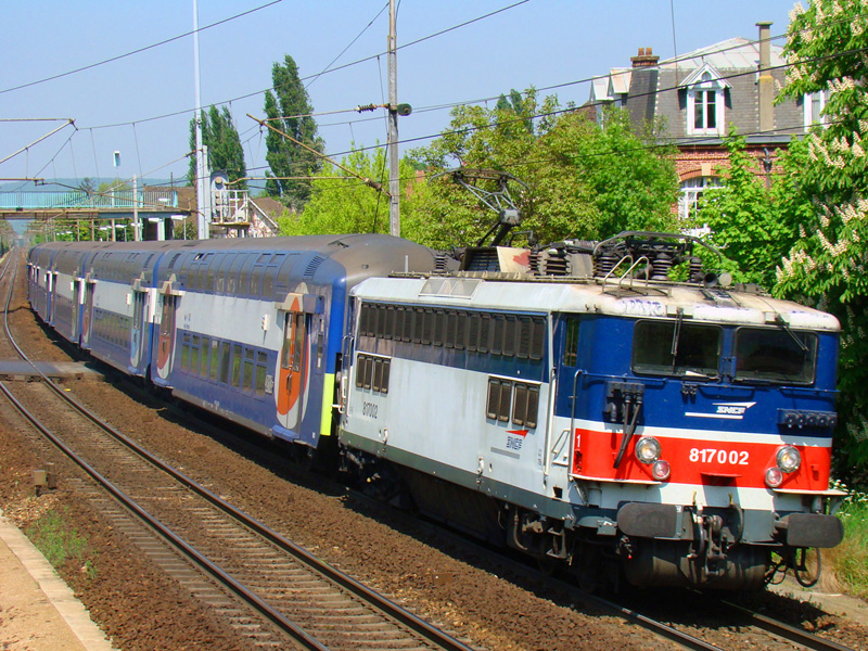 Le BB.17002 en livrée Ile-De-France en tête d'une rame de VB2N (Voiture de Banlieue à 2 Niveaux) sur un train Transilien Mantes-la-Jolie _ Paris-Saint-Lazare